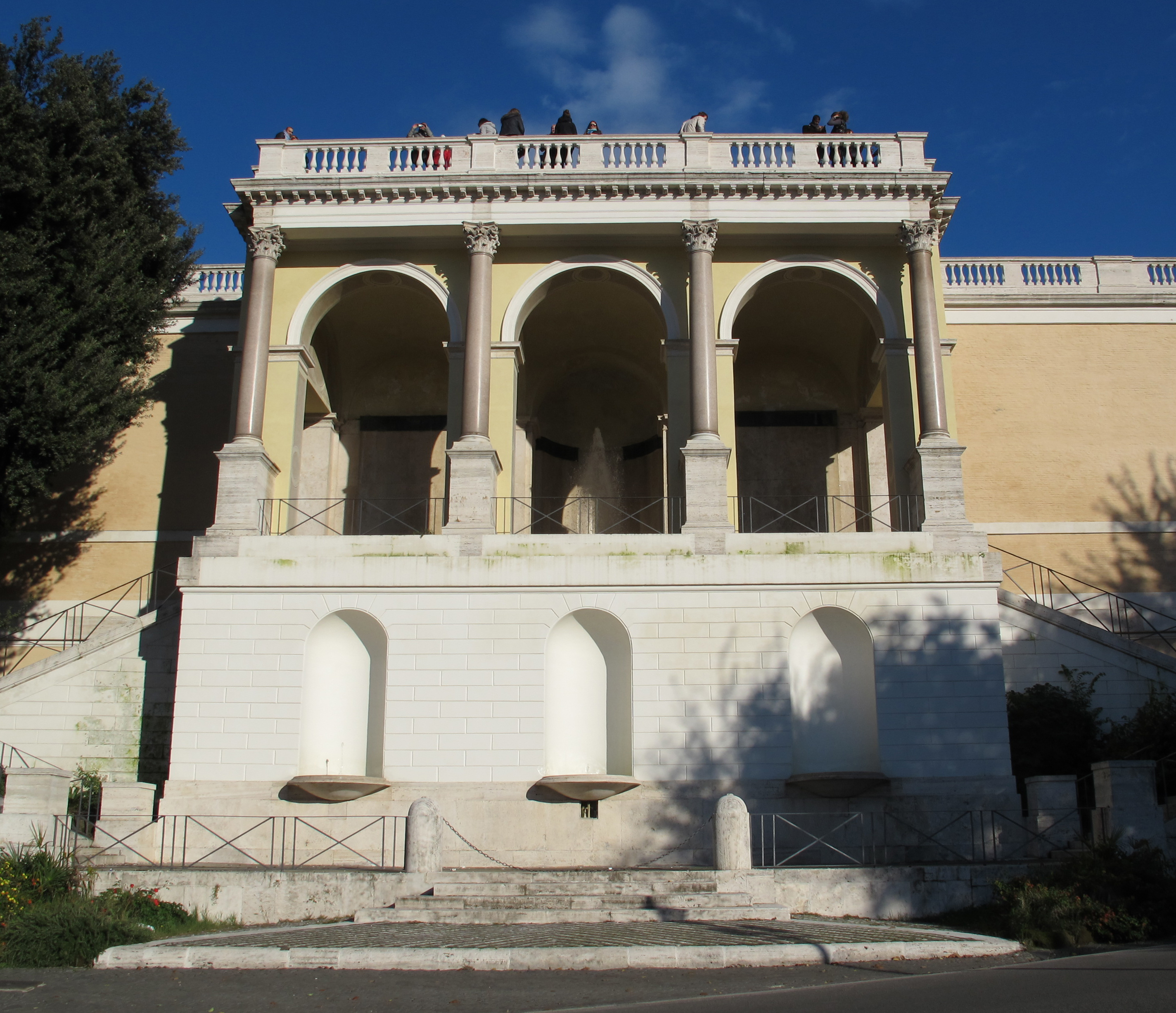 Roma, vedi titolo